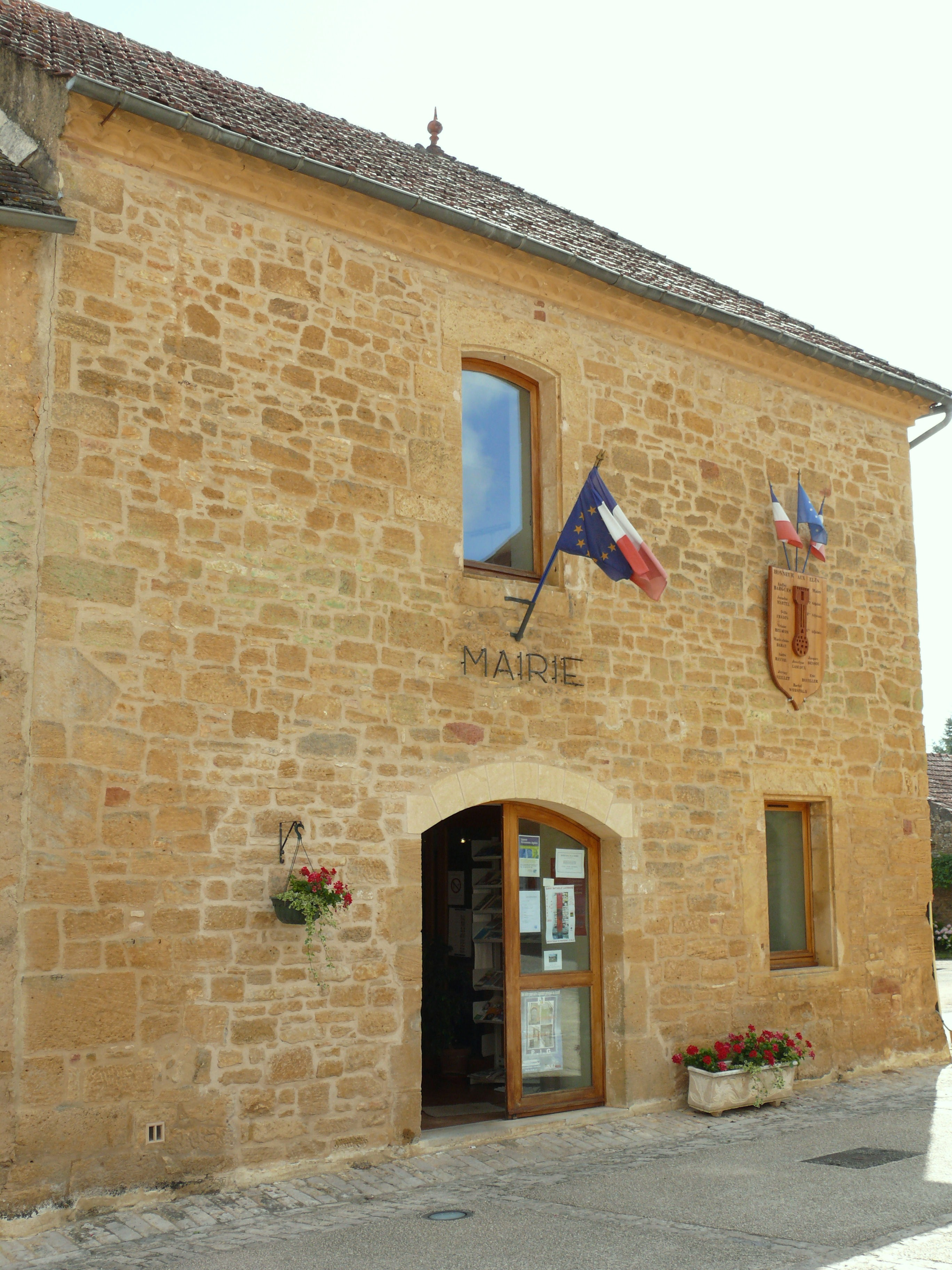 Marminiac - Mairie